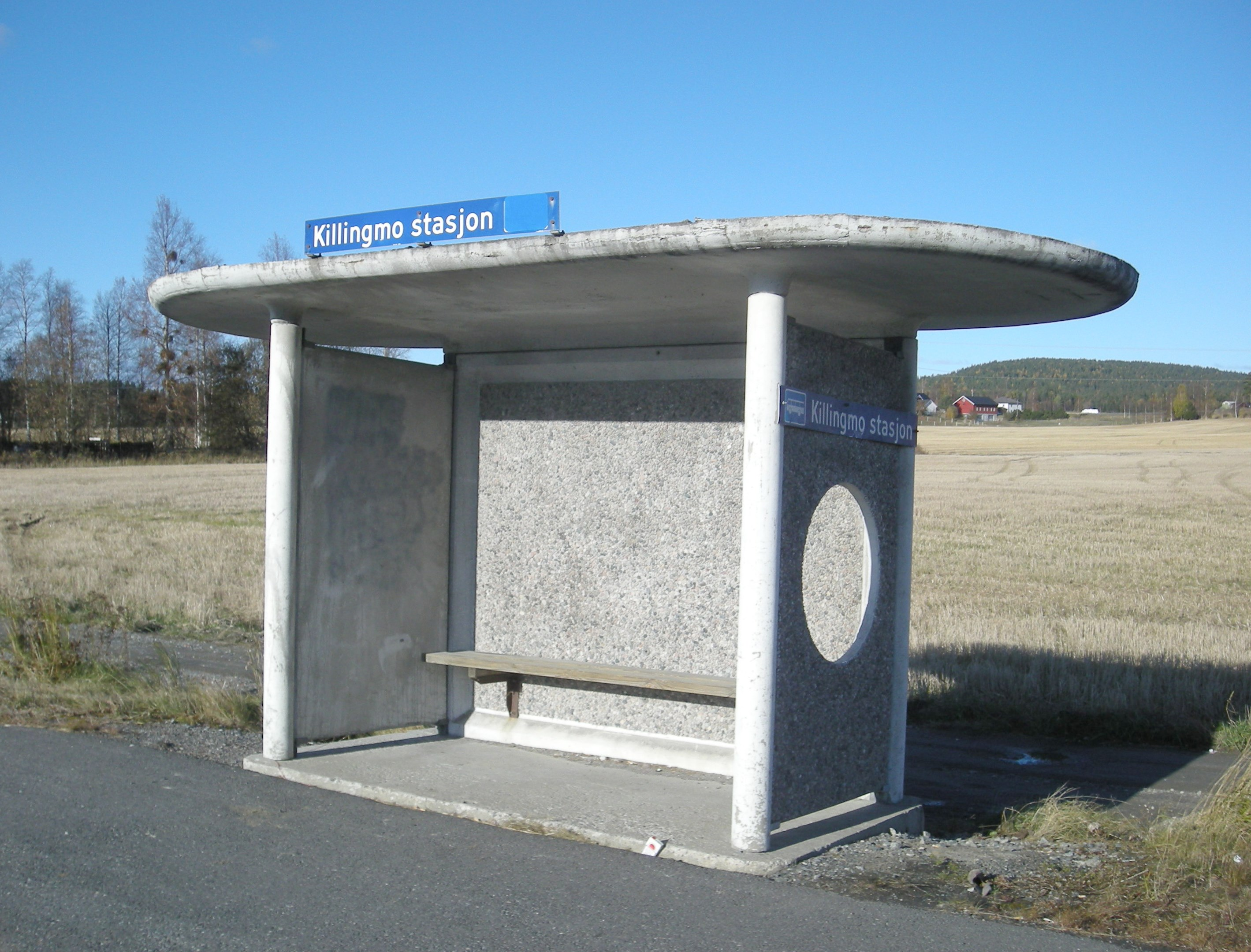 Bussholdeplass ved tidligere Killingmo stasjon i Aurskog